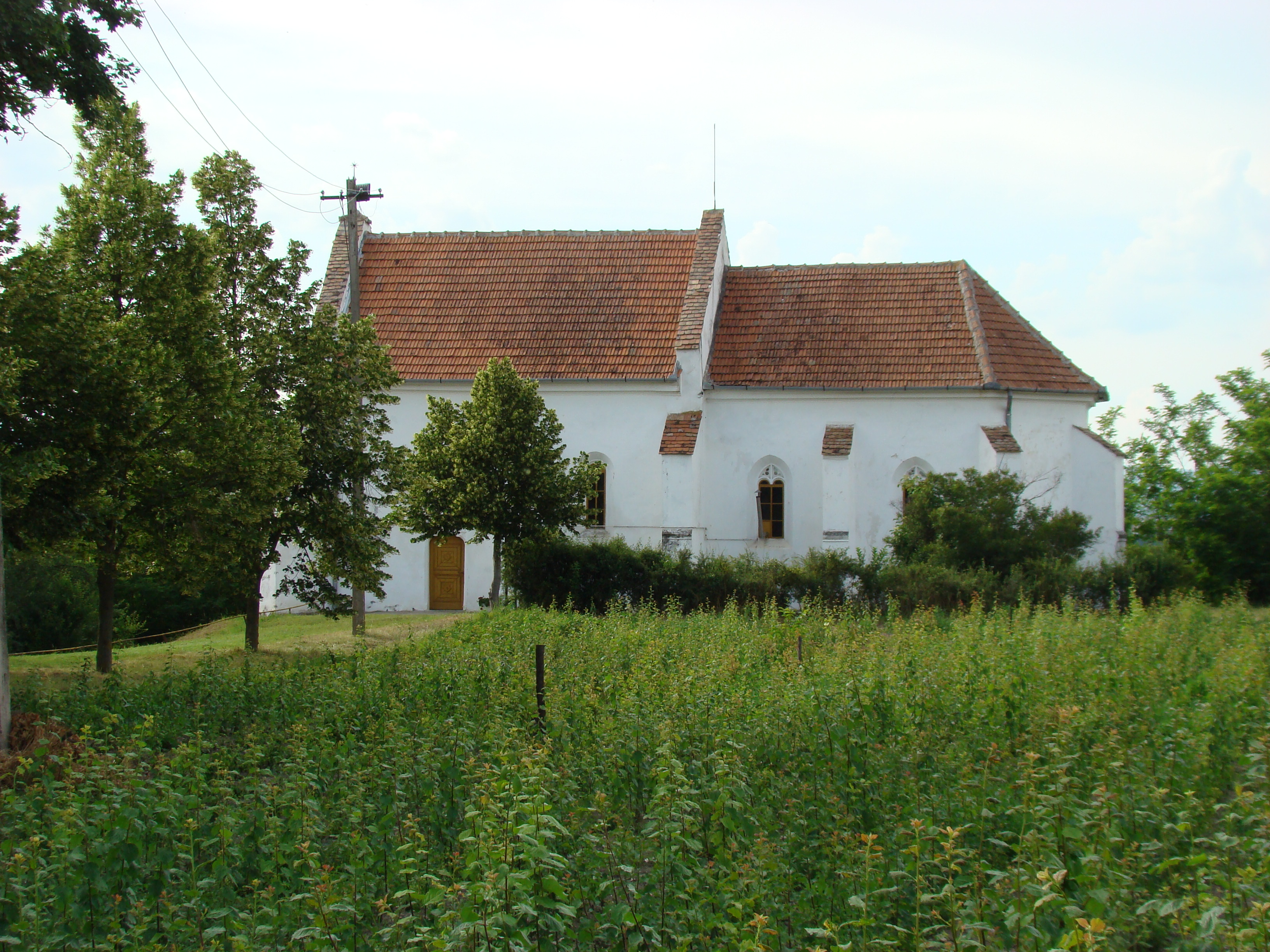 Biserica reformată, sat aparținător Sâncrai; municipiul Aiud, județul Alba 01